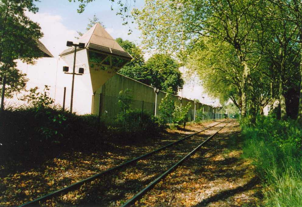 Aussenmauer der JVA Krümmede in Bochum